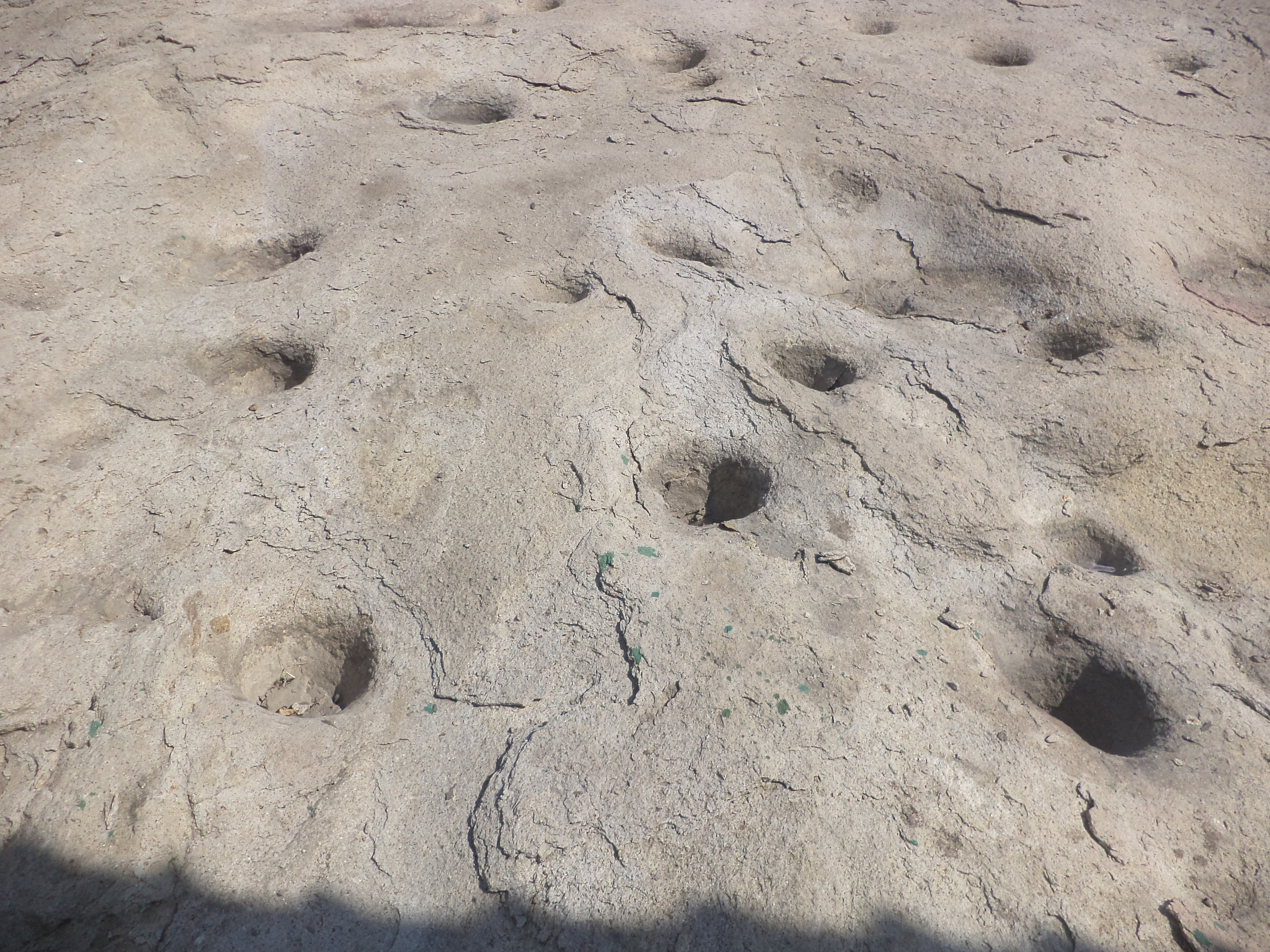 130 hendiduras con forma de "tacitas", que los indígenas picunches utilizaban como morteros en Cerro Blanco en Santiago de Chile.